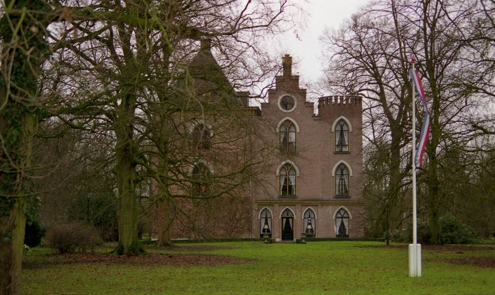 Ridderhofstad Hindersteyn te Neerlangbroek.